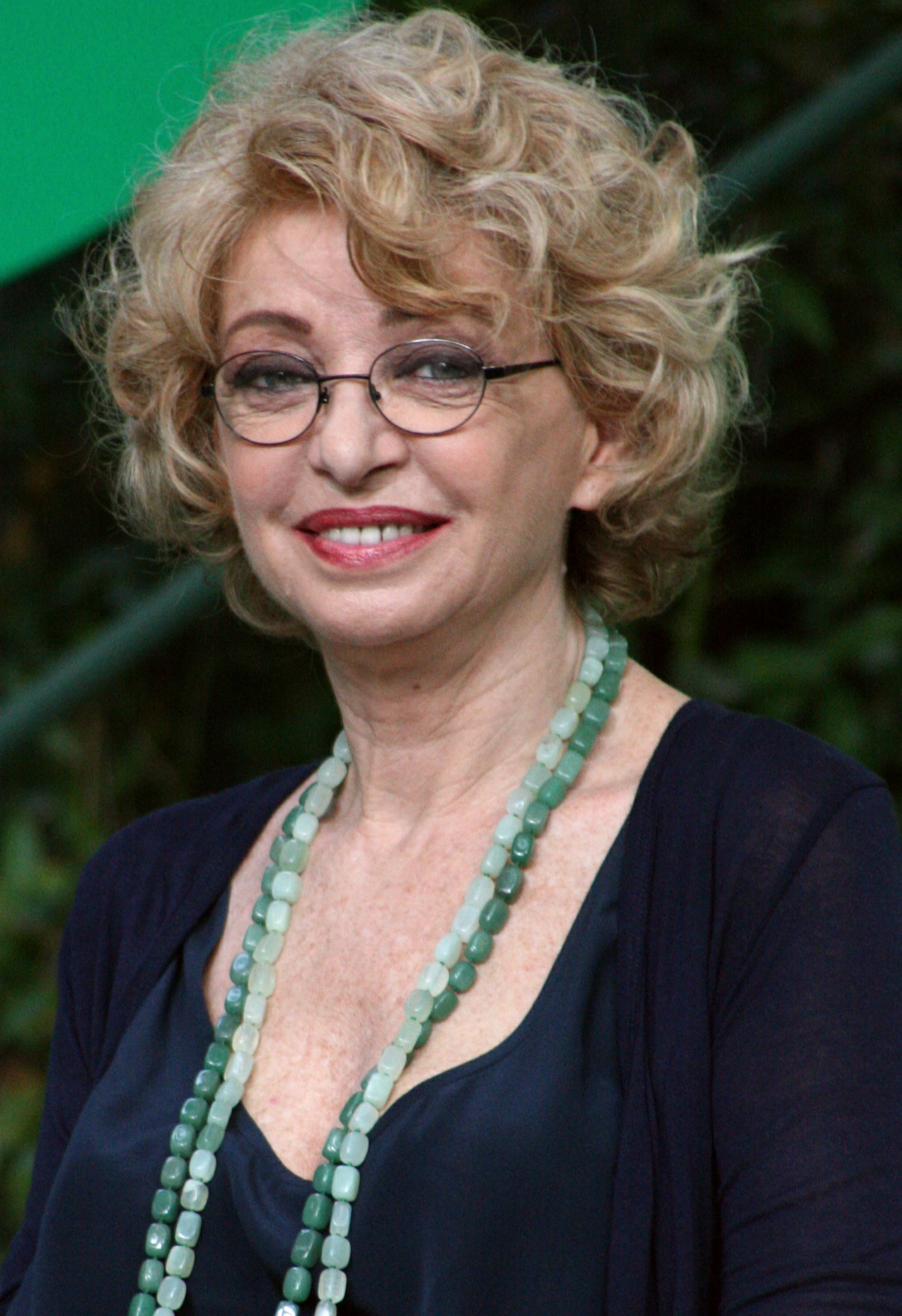 Enrica Bonaccorti